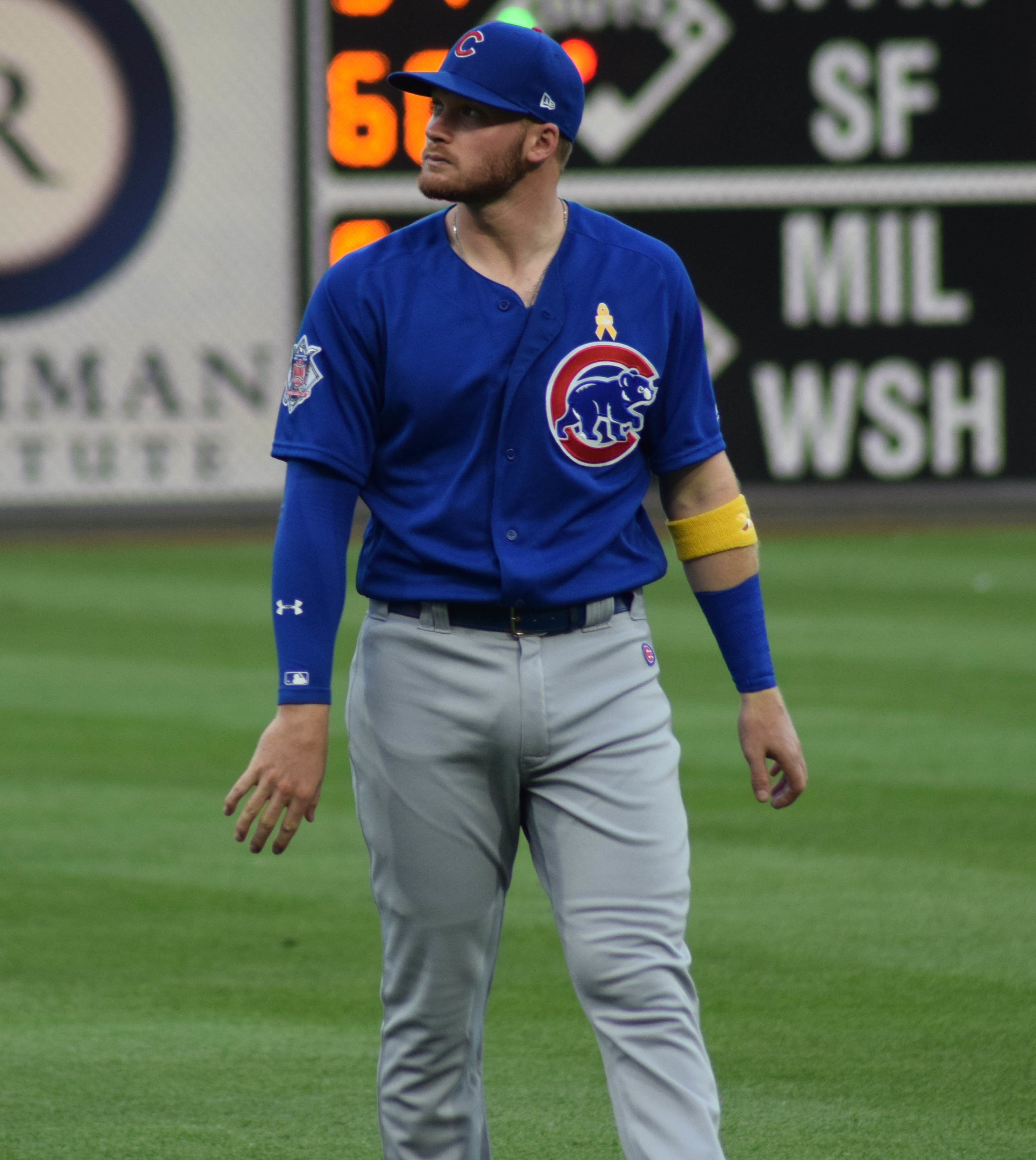 Ian Happ